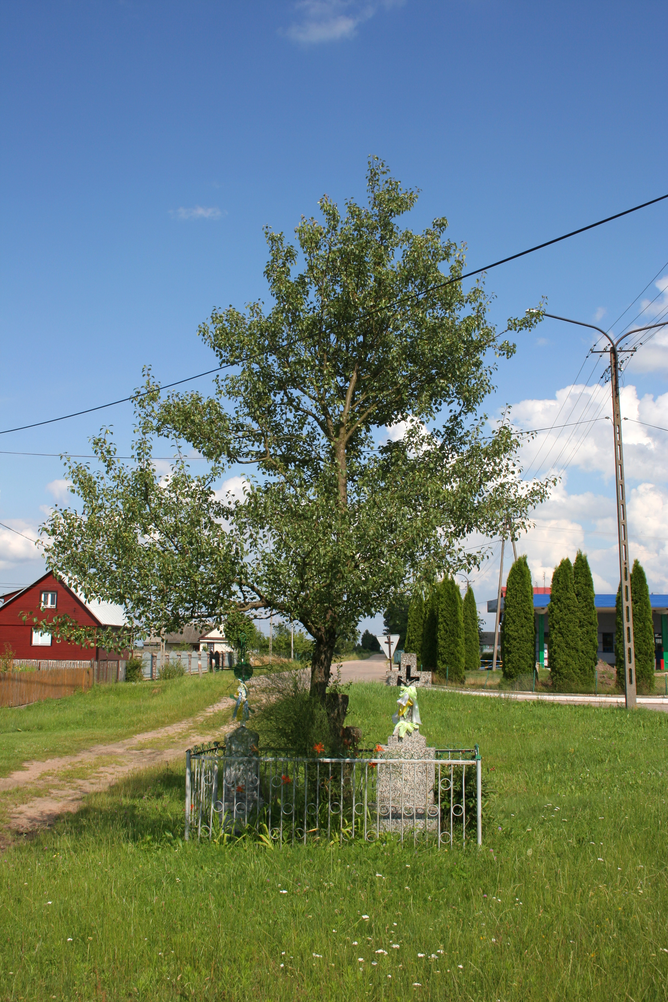 Krzyże przydrożne w Czeremsze-Wsi.